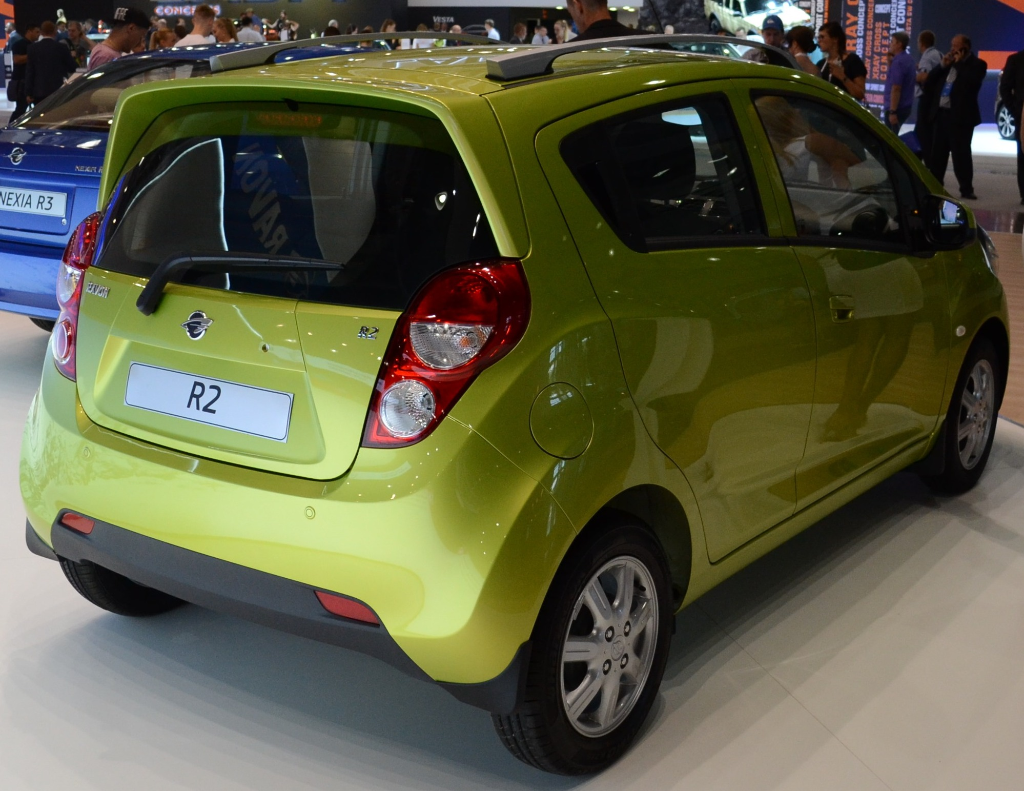 Хэтчбек Ravon R2 на Московском автосалоне 2016